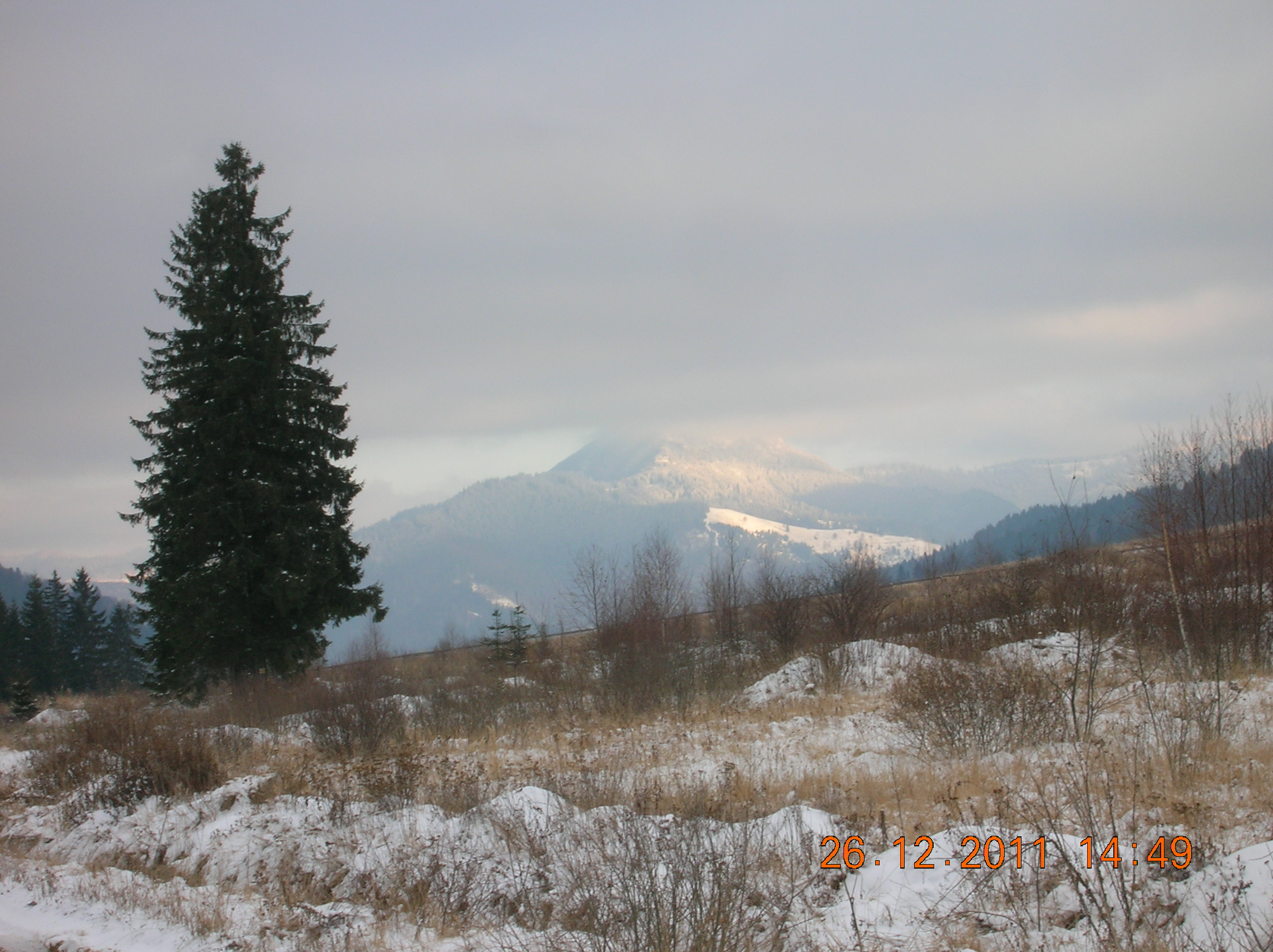 Piatra Vitoș din Munții Hășmaș, imagine de iarnă din Pasul Țengheler